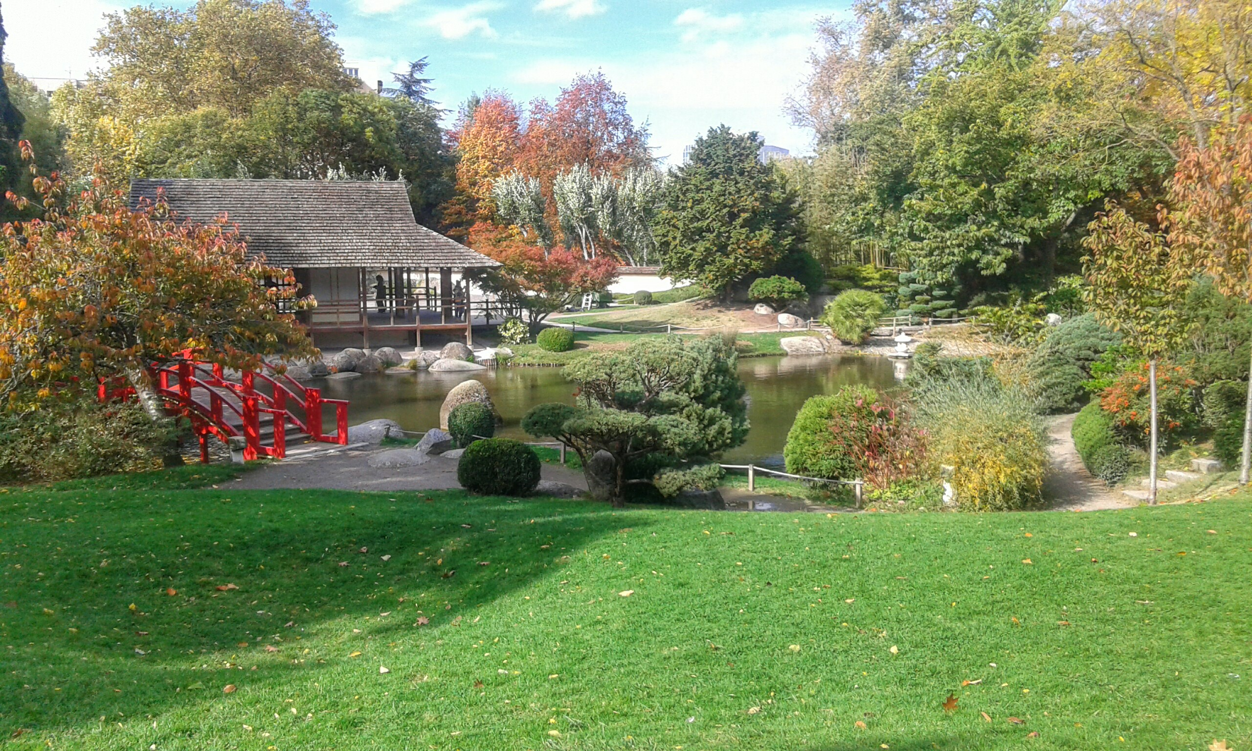 Jardín Japonés de Toulouse.